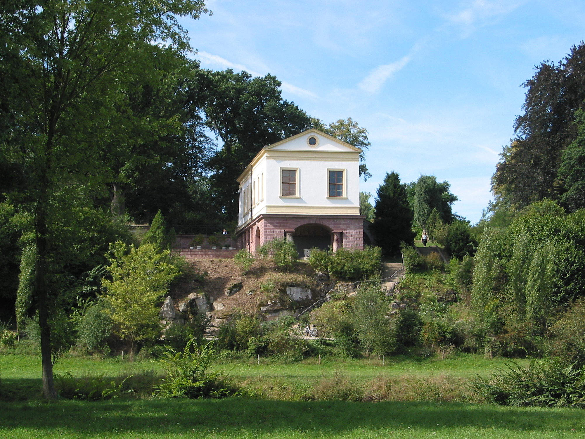 Das Römische Haus im Park an der Ilm in Weimar (Blick von Osten).